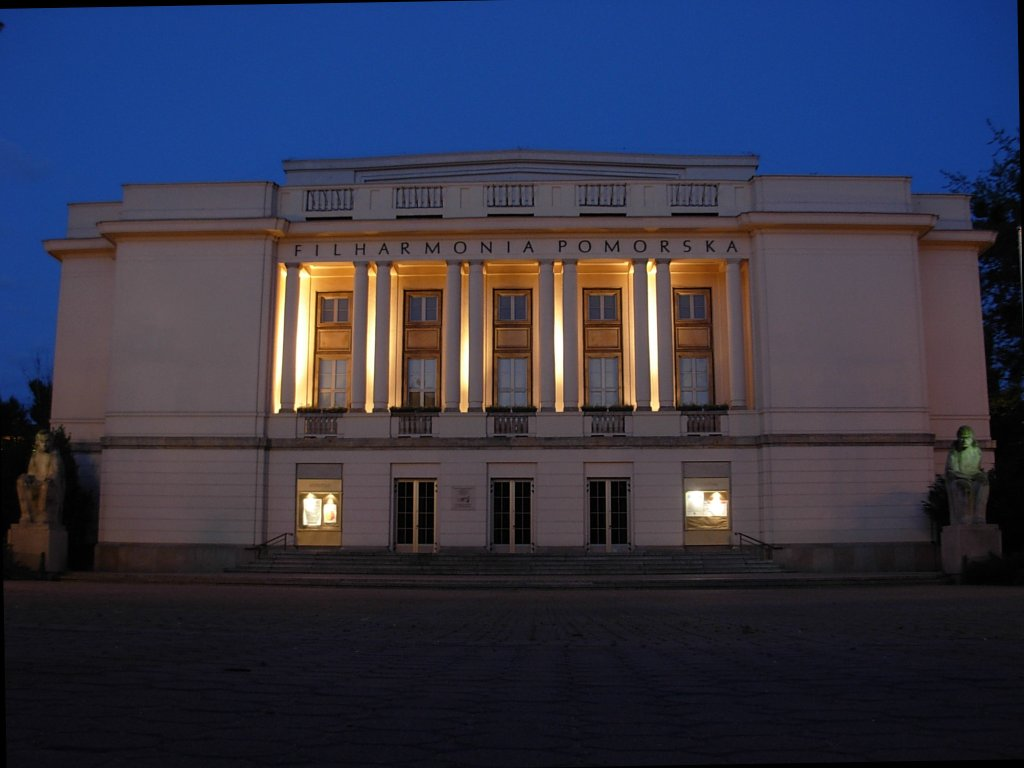 Filharmonia Pomorska w Bydgoszczy